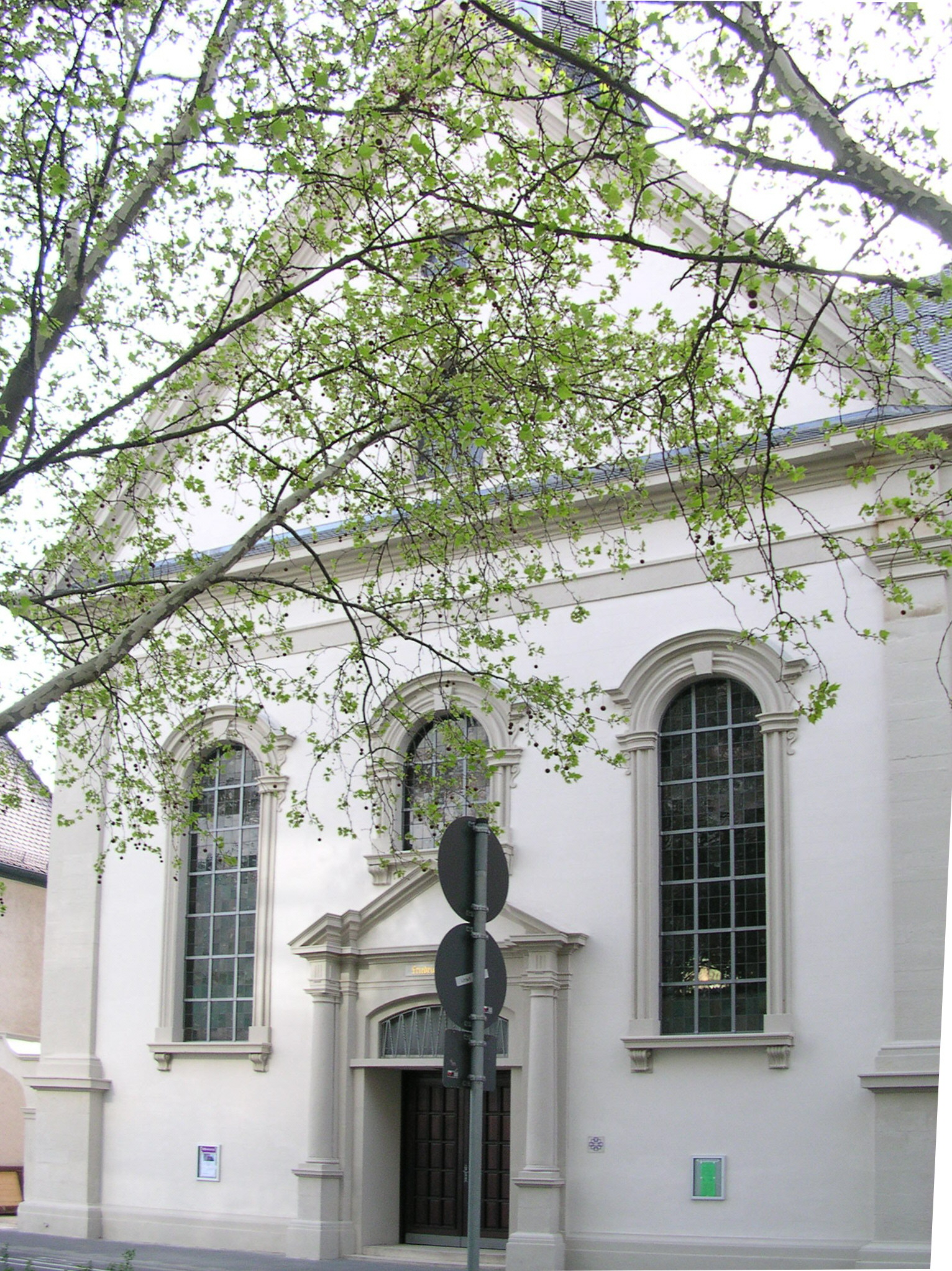 Worms, Friedrichskirche - Von der 1699 zugelassenen reformierten Gemeinde mit finanzieller Unterstützung auch aus Preußen (Name nach Friedrich d. Gr.) erbaut, benutzt ab 1744